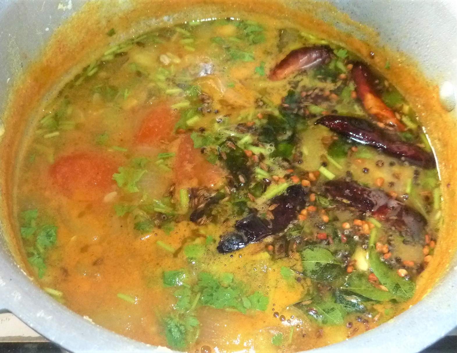 టమాట చారు